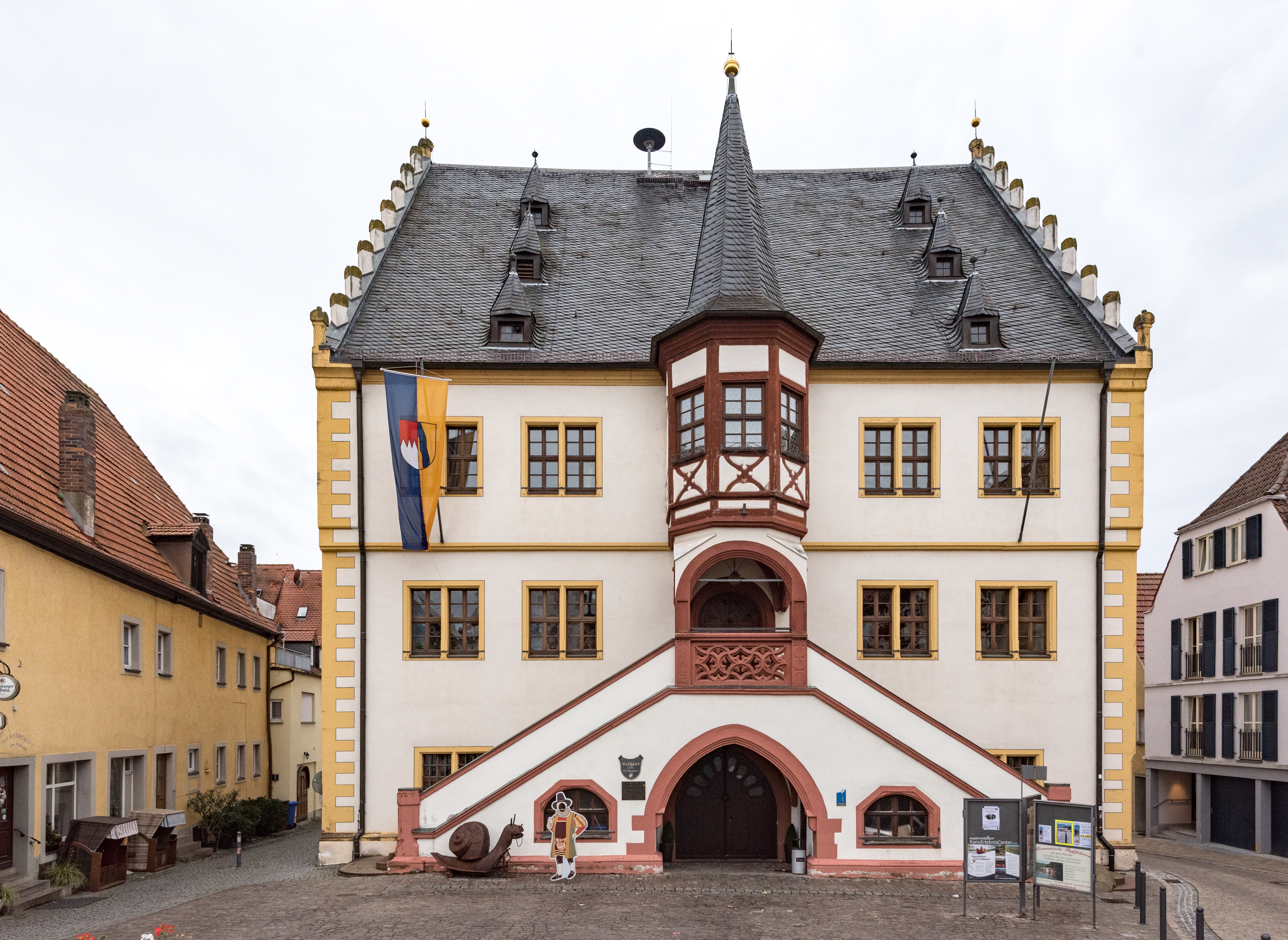 Volkach, Marktplatz 1